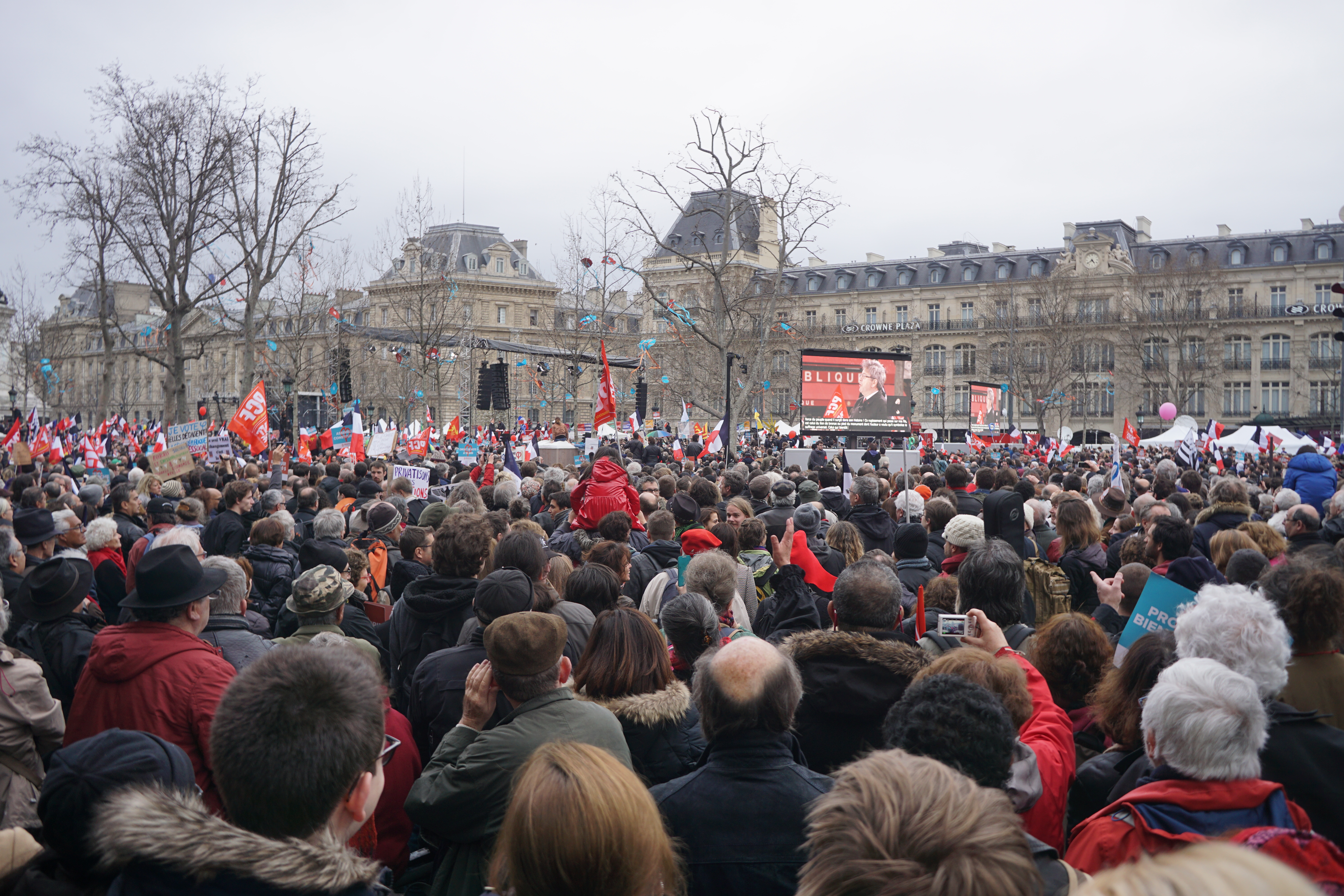 Marche pour la 6ème République 18 mars 2017 Place de la République